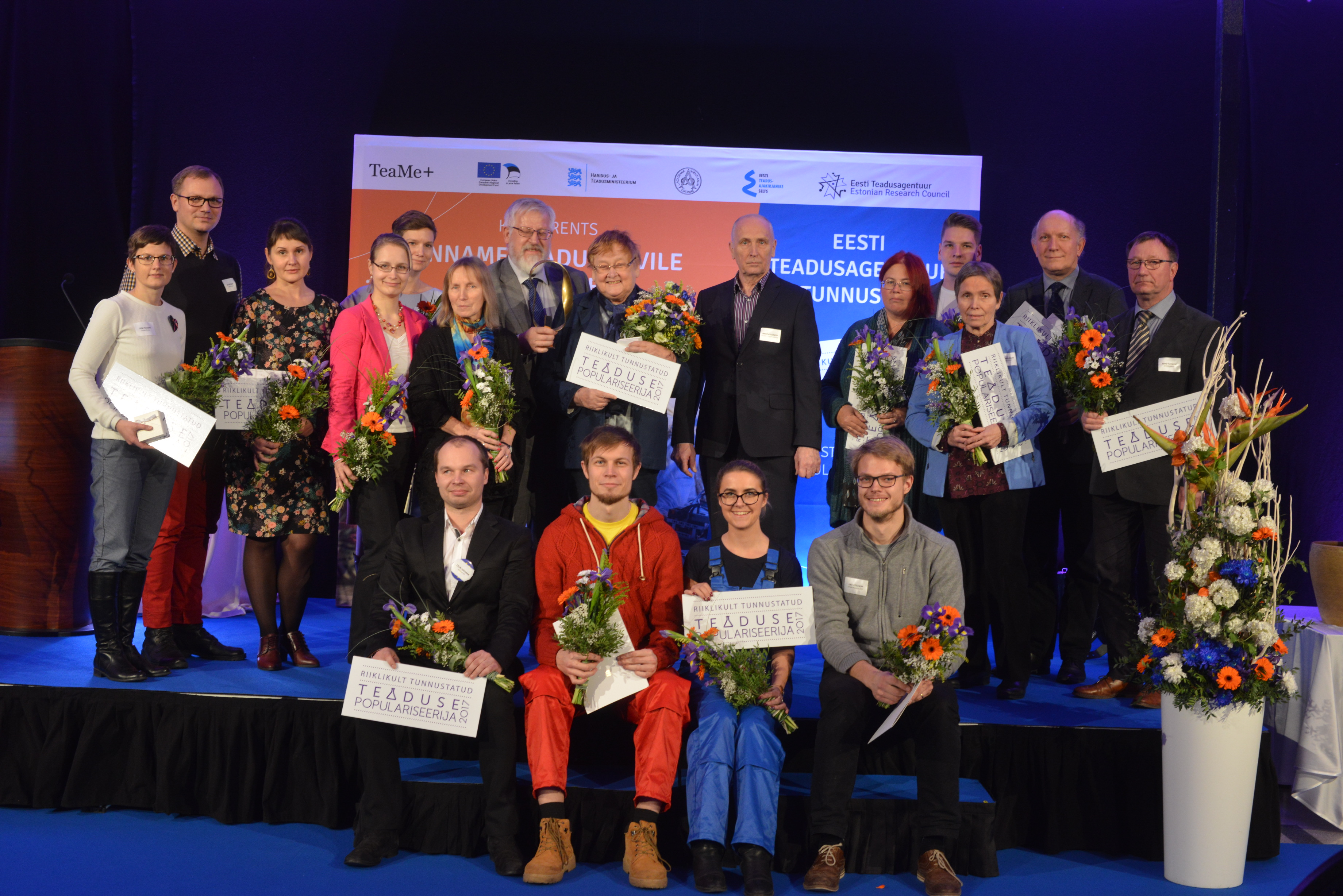 Eesti teaduse populariseerimise riiklike auhindade võitjad.